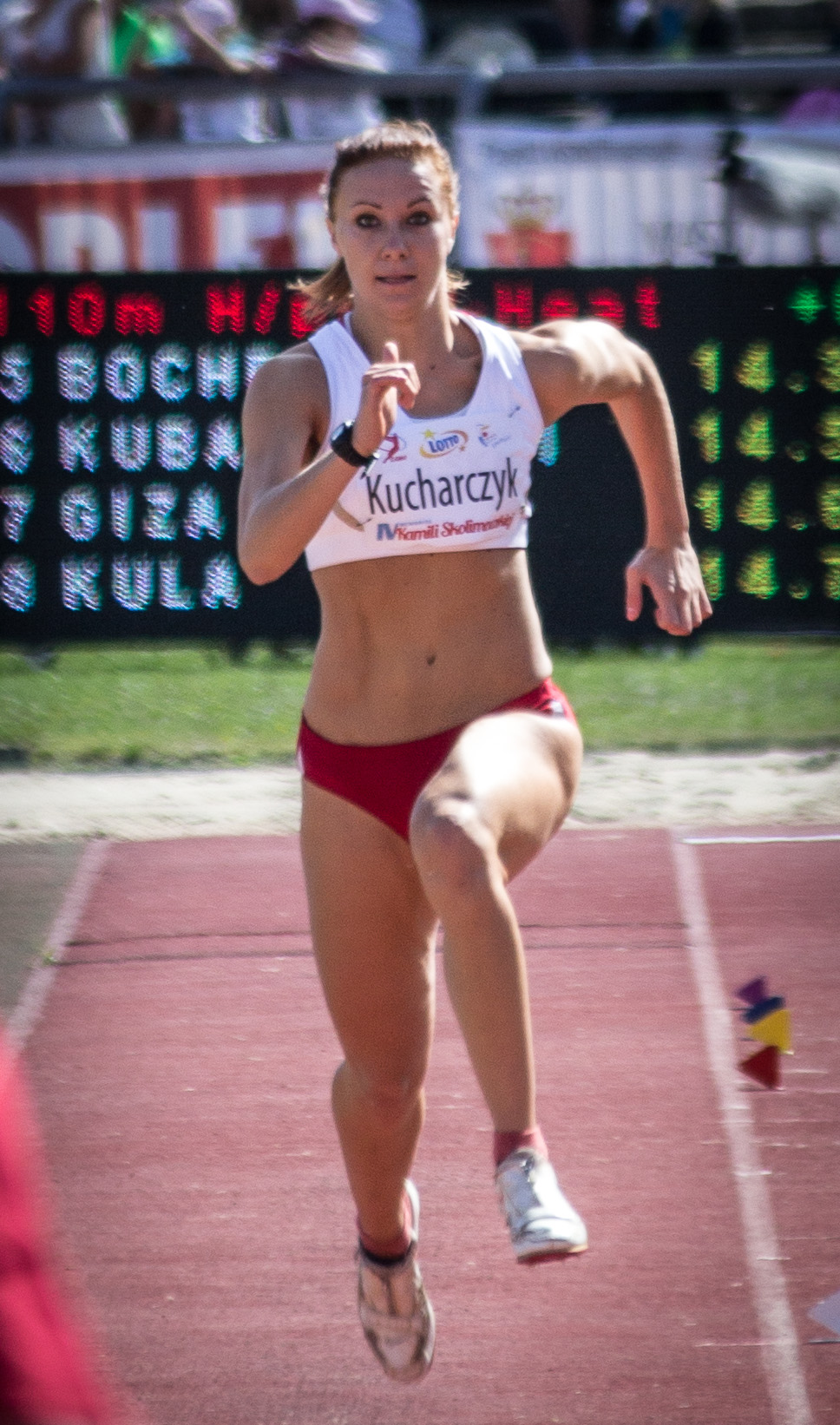 Memoriał Kamili Skolimowskiej w Warszawie, 2013-08-25